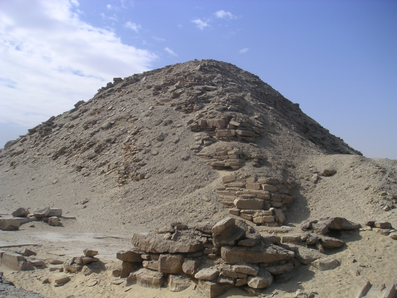 Vue de l'angle nord-est de la pyramide de Niouserrê à Abousir - Ve dynastie égyptienne